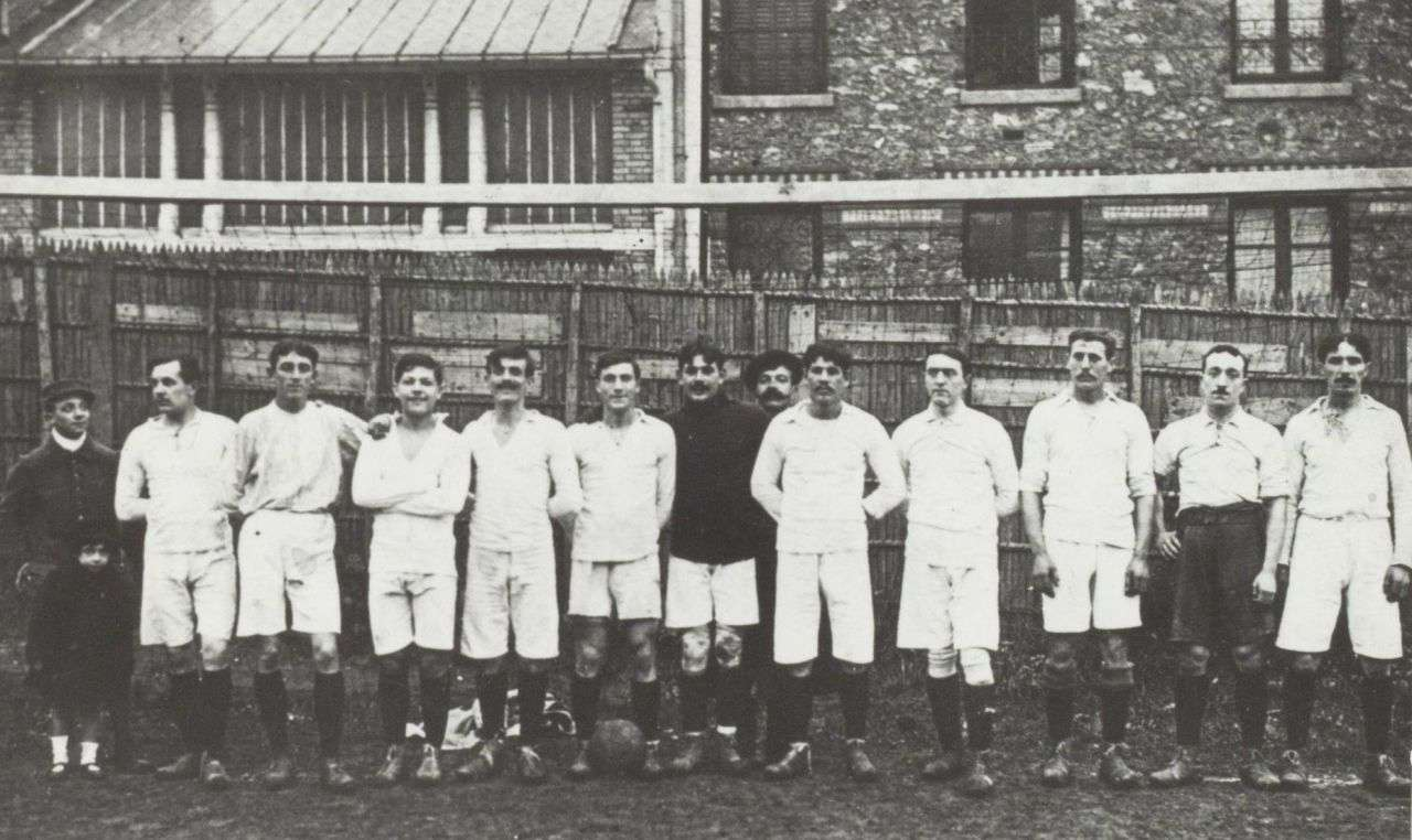 L'Olympique lors de la Coupe de France 1917-1918. De nombreuses sources indiquent qu'il s'agit d'une photo de la finale. Il s'agit en réalité du seizième de finale (source : L'Equipe, Coupe de France, La folle épopée). La composition est Van Steck, Paul Landauer, Jules Dewaquez, Cherain, Louis Darques, Jousserand, Emile Fiévet, Lansdorp, Julien Lina, Charles Olivan, Henri Delouys (source : Fédération française de football, Cinquantenaire de la Coupe de France de football (1917-1967), Paris, Amphora, 1967, page 43)